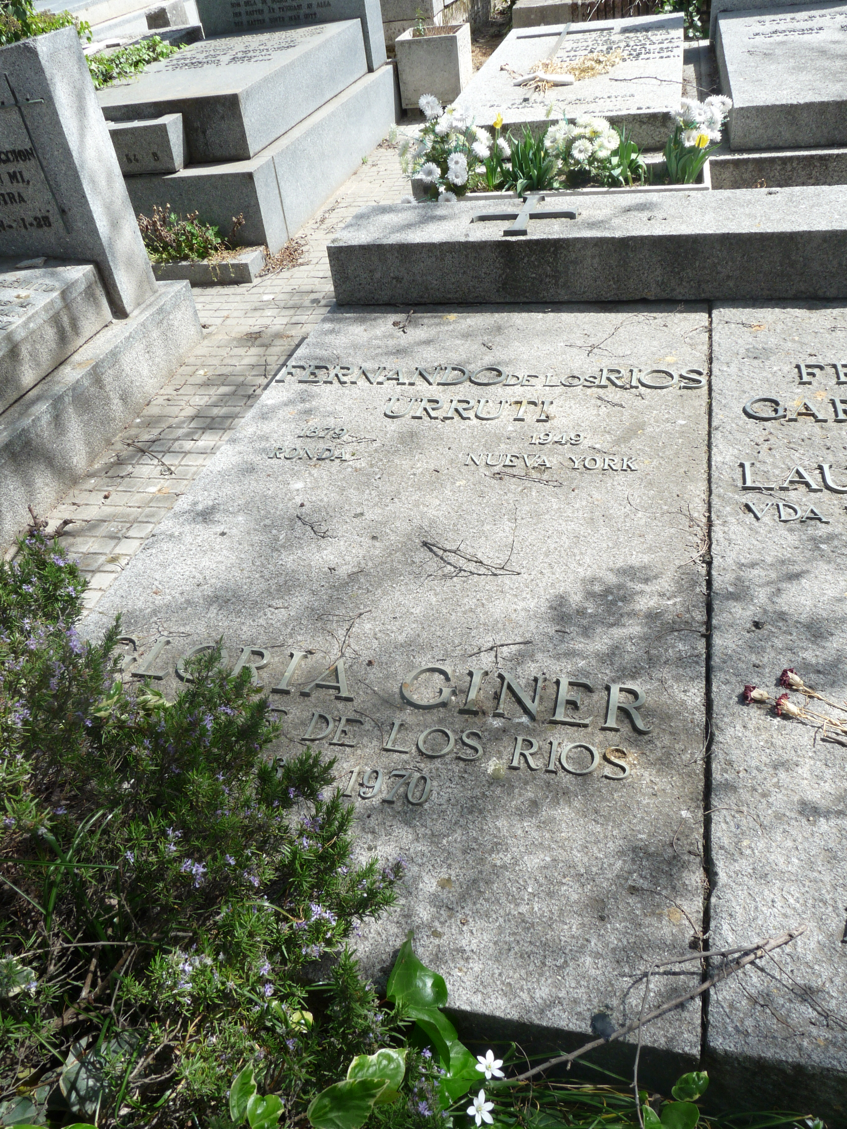 Tumba de Fernando de los Ríos y Gloria Giner de los Ríos en el cementerio civil de Madrid.